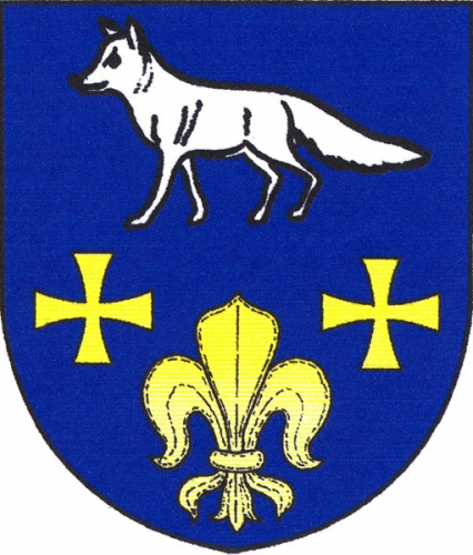 znak, Pokojov, okres Žďár nad Sázavou